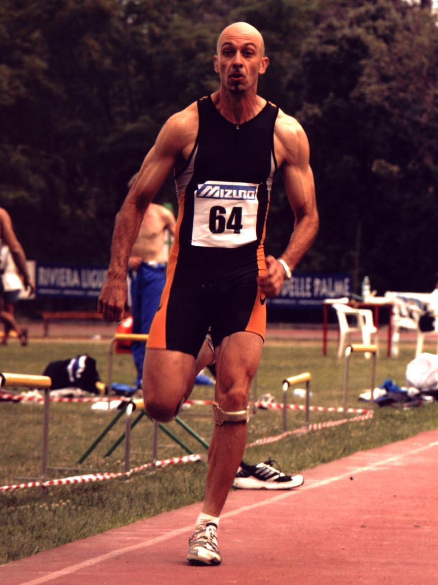 Avi Tayari